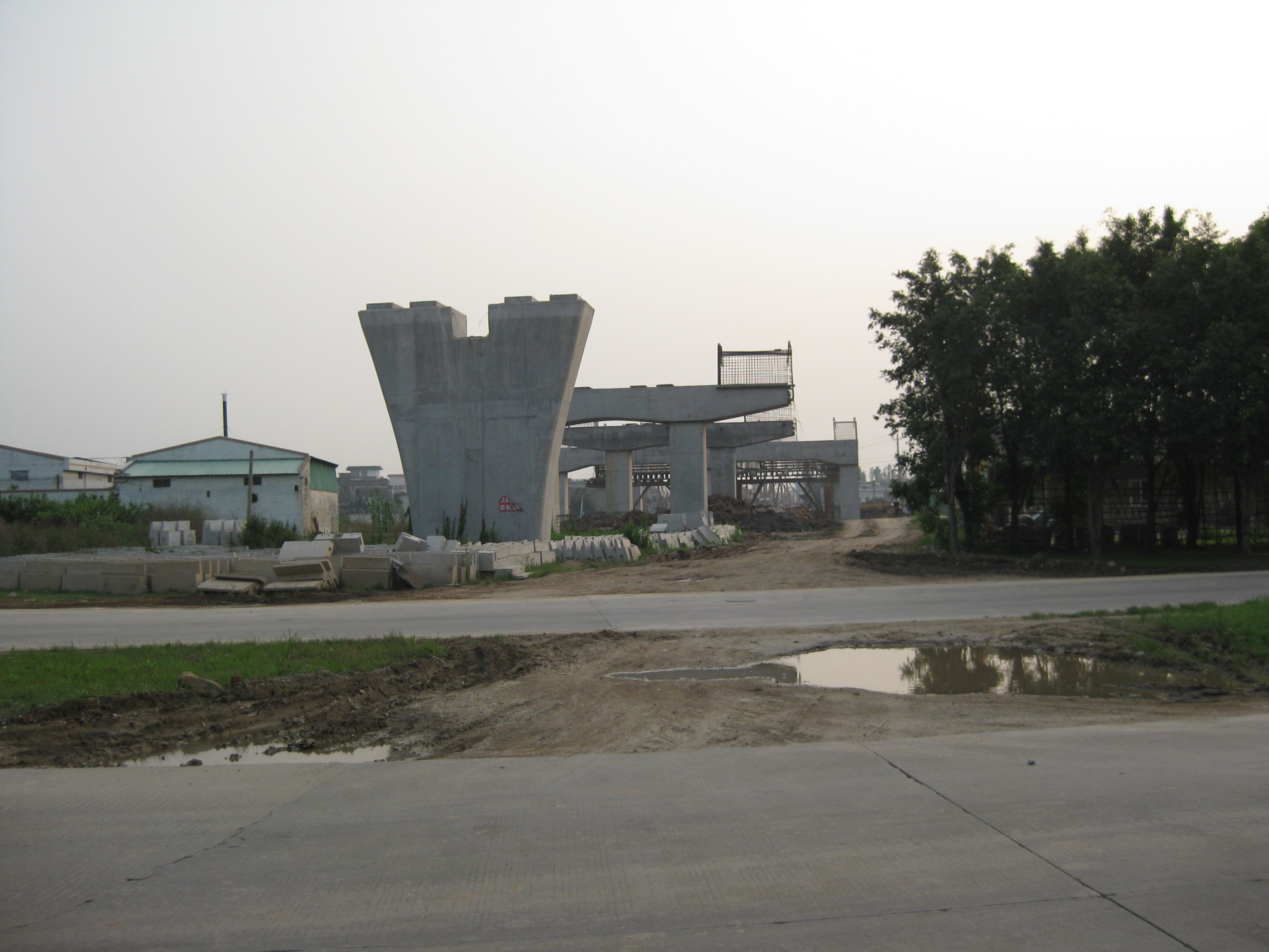 江海站地盘